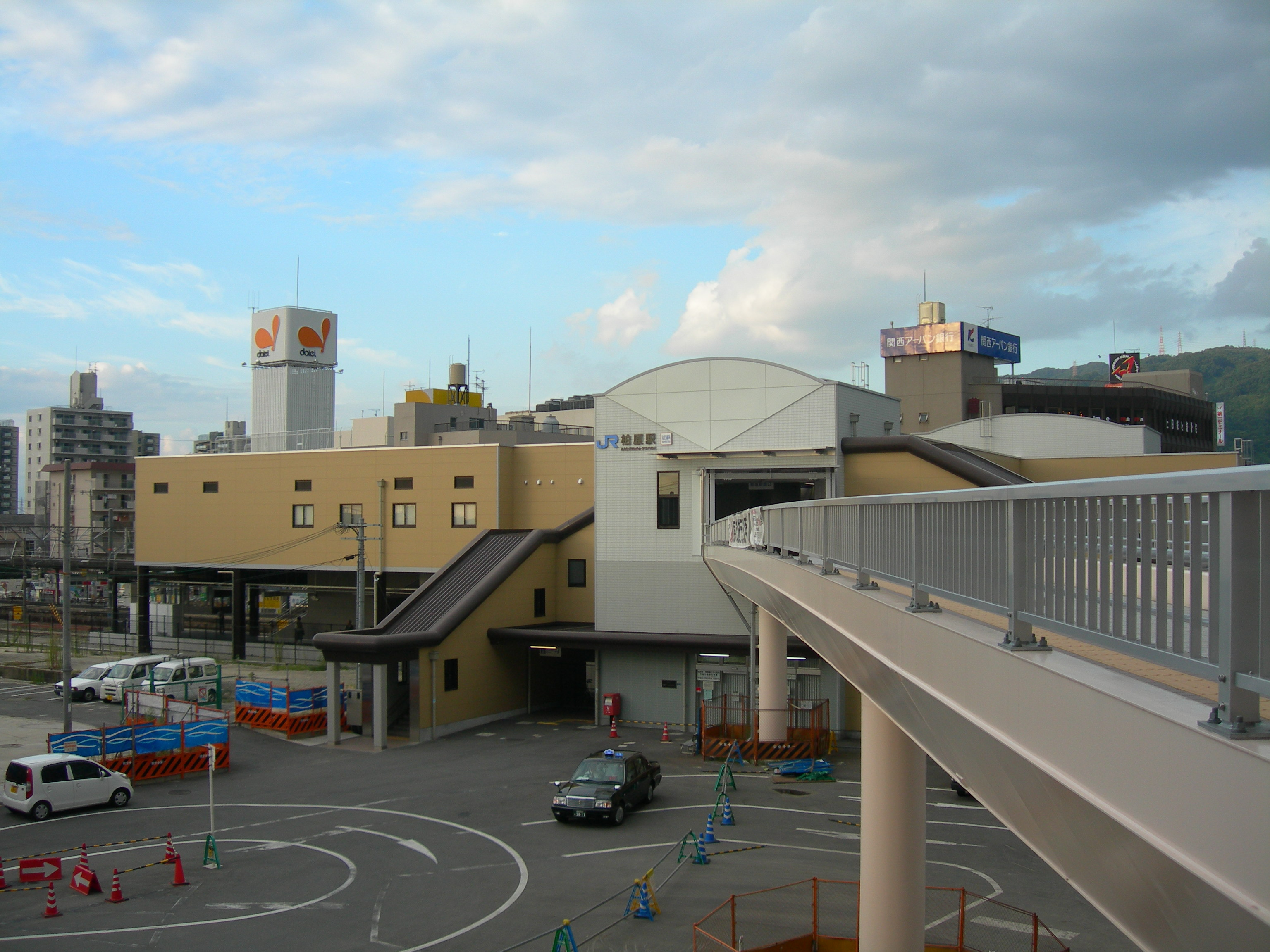 柏原駅 (大阪府)西口